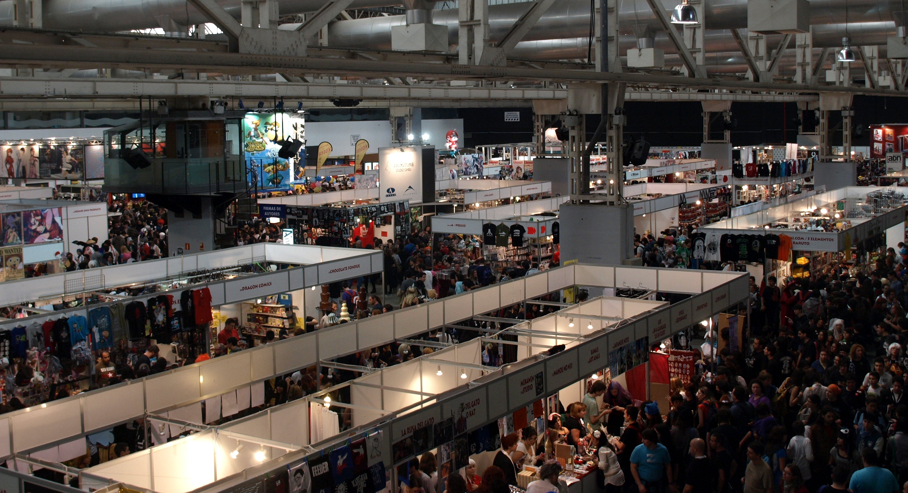 Salón del Manga de Barcelona (2011) en La Farga, Hospitalet de Llobregat (Barcelona, España).